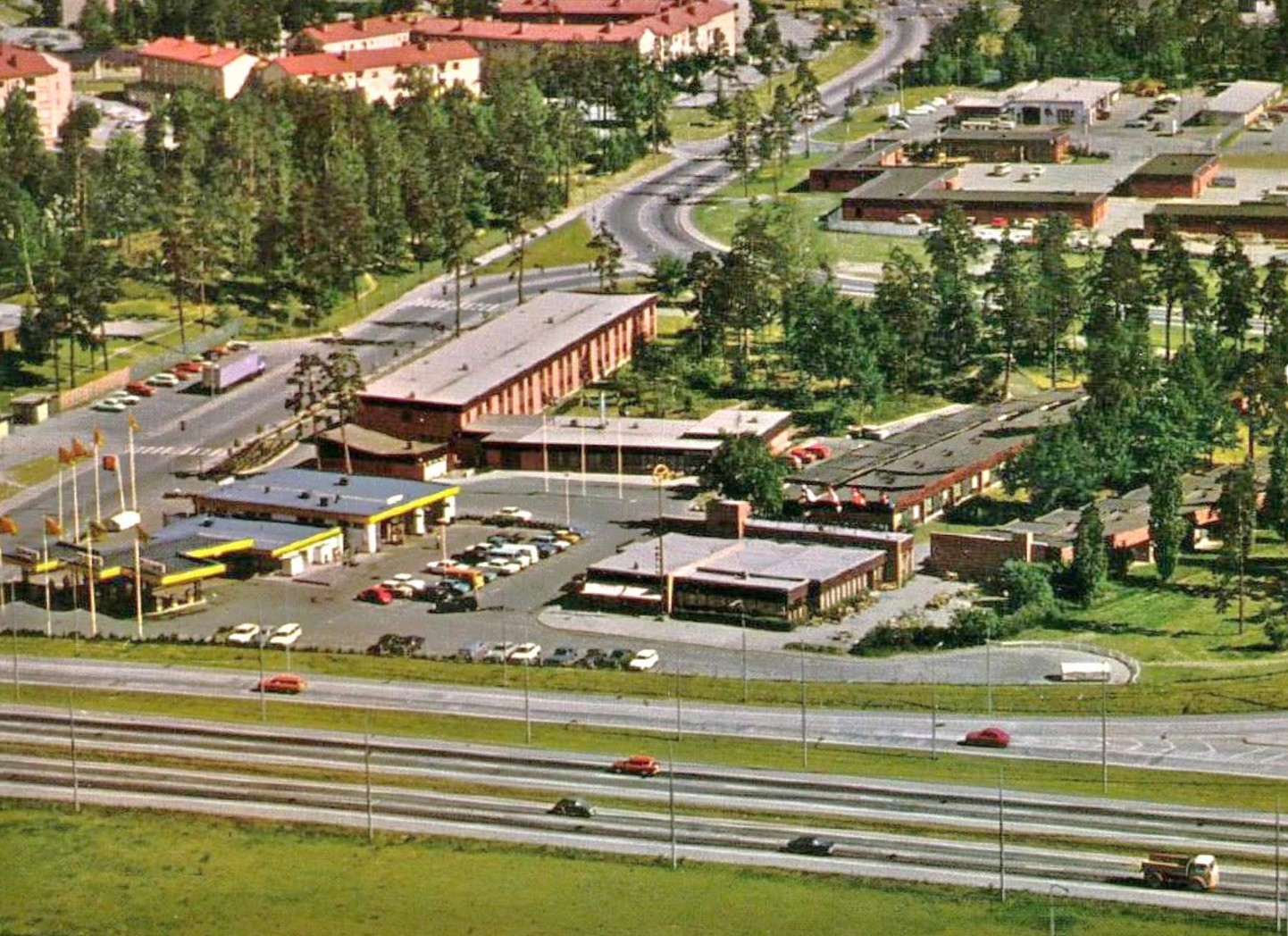 Motellet "Gyllene ratten" utanför Stockholm